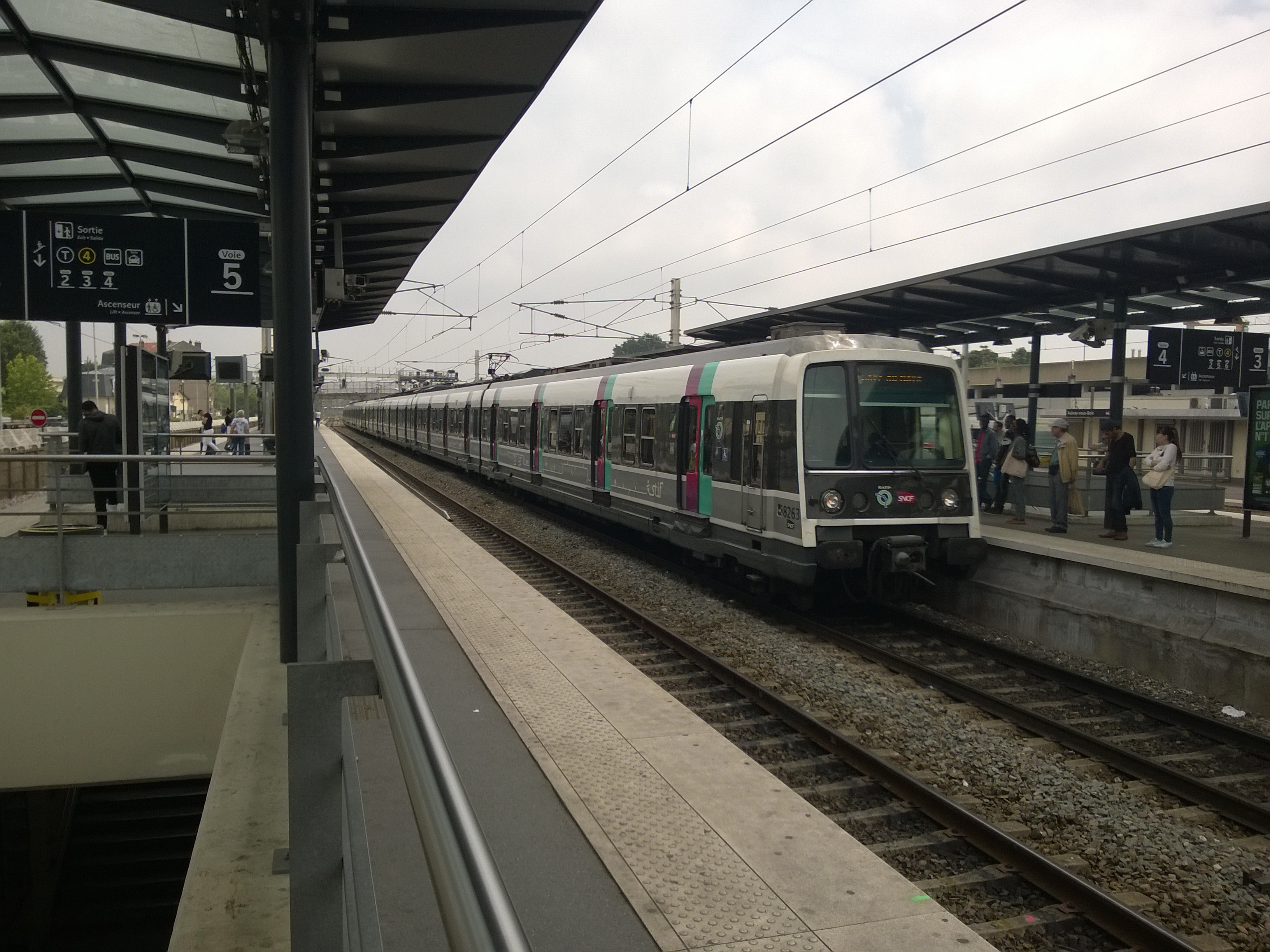 En gare d'Aulnay-sous-Bois, une unité multiple du MI 79R pour la gare du Nord à cause de la grève intermittente de 2018, parti de Mitry - Claye, département de la Seine-Saint-Denis, France.